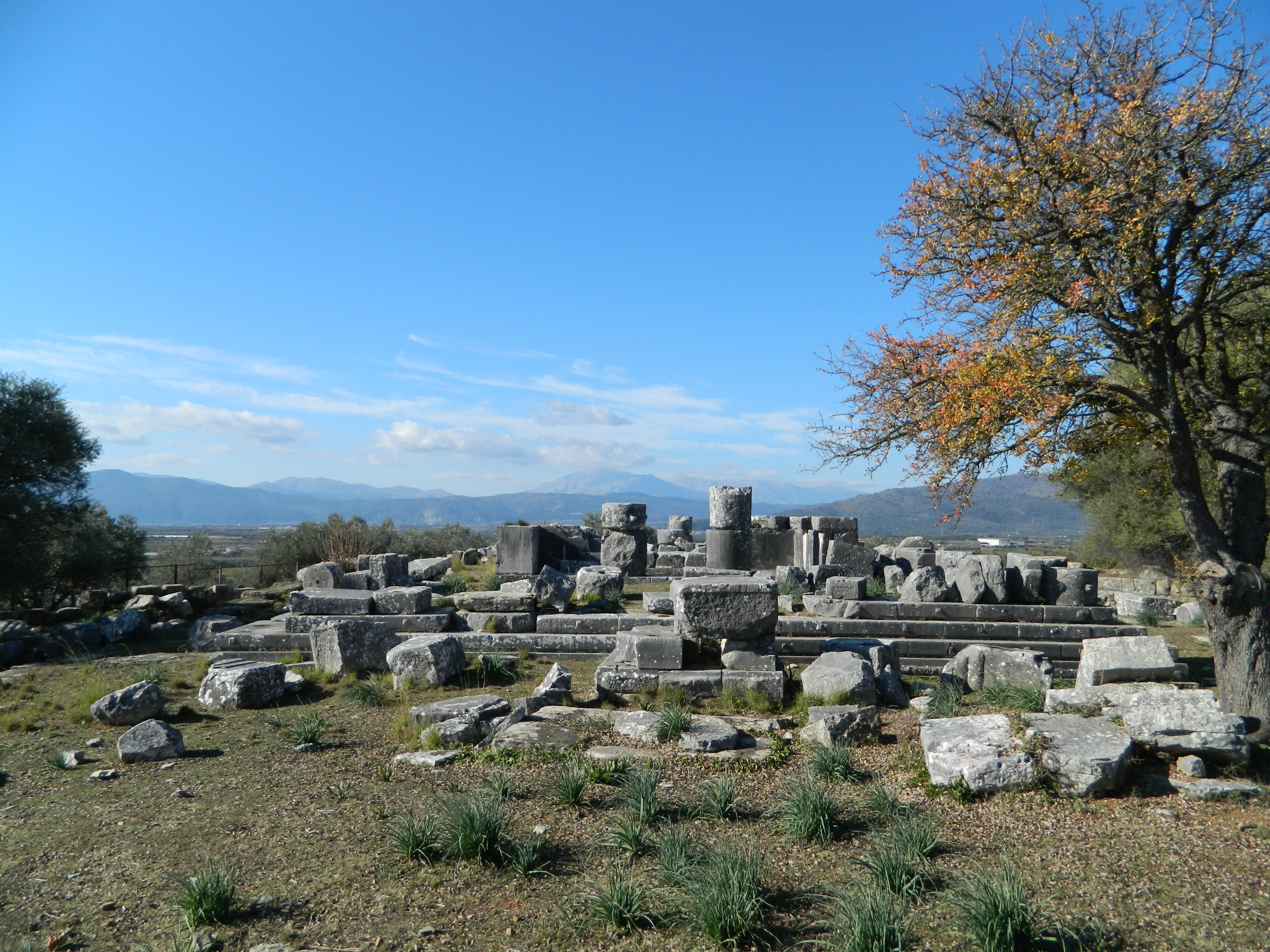 Ναός Στρατίου Διός«Ναός Στρατίου Διός»